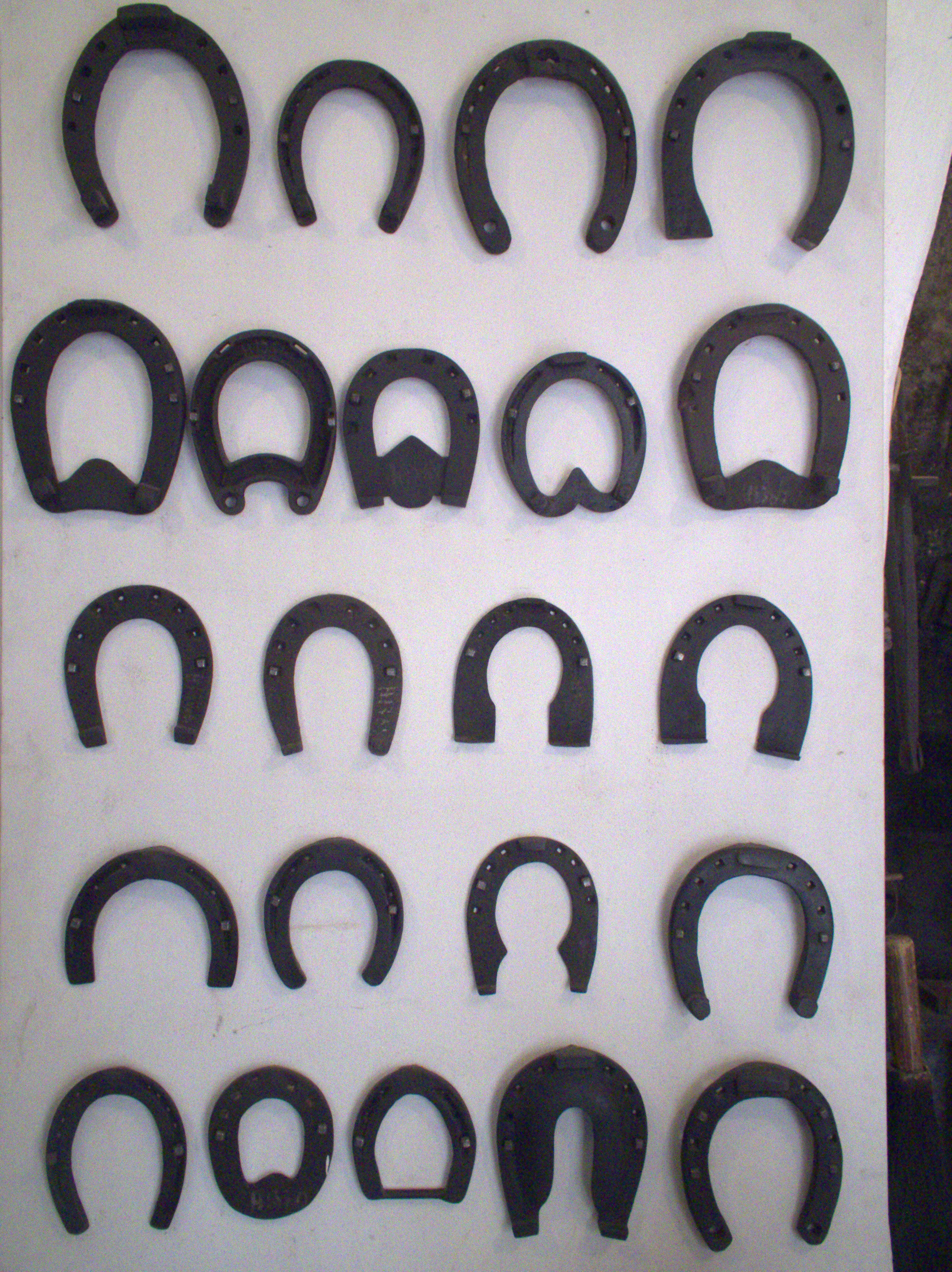 Hirtenmuseum Hersbruck: Hufeisen